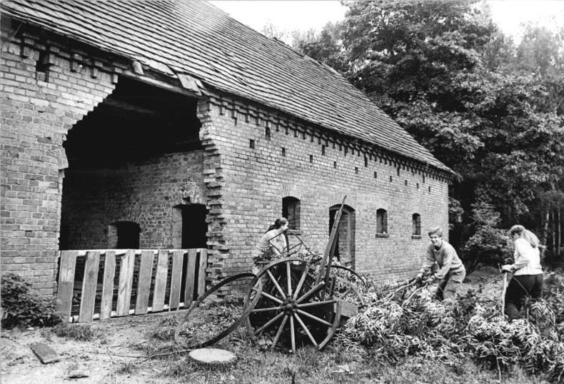 Spreewald, Teilnehmer eines ökologischen Work-Camps ADN-Rainer Weisflog 24.9.1990 Bez. Cottbus: Naturschutz- Gegenwärtig wird im anerkannten Biosphärenreservat Spreewald eine Naturschutzstation im ehemaligen Forsthaus " Eiche" eingerichtet, einem seit zehn Jahren leerstehenden Gebäude. Dabei helfen während eines zweiwöchigen sogenannten Work-Camps junge Naturschützer aus der BRD, Frankreich, Ghana, Hong Kong, den Niederlanden und den USA.